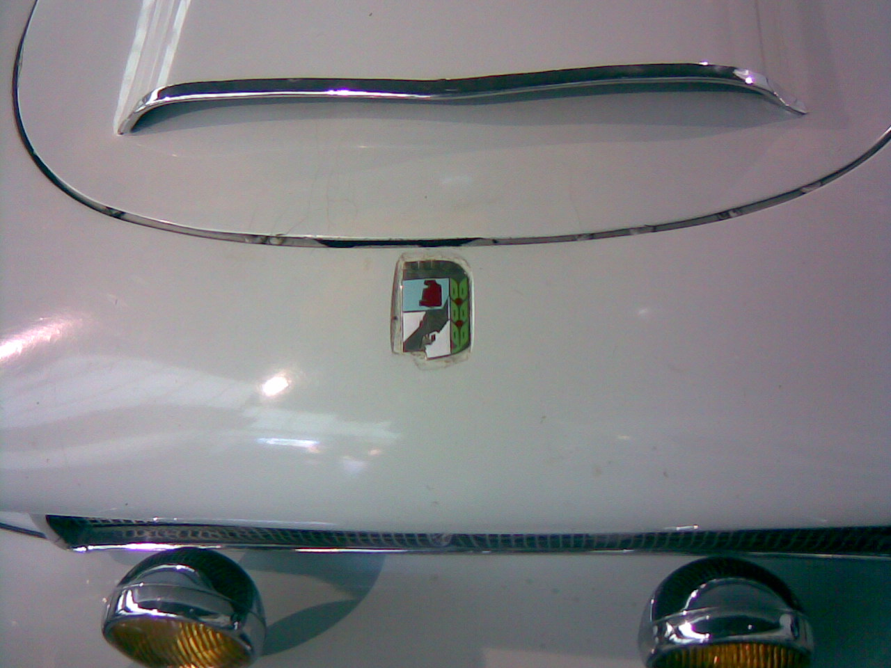 Auto justicialista 02